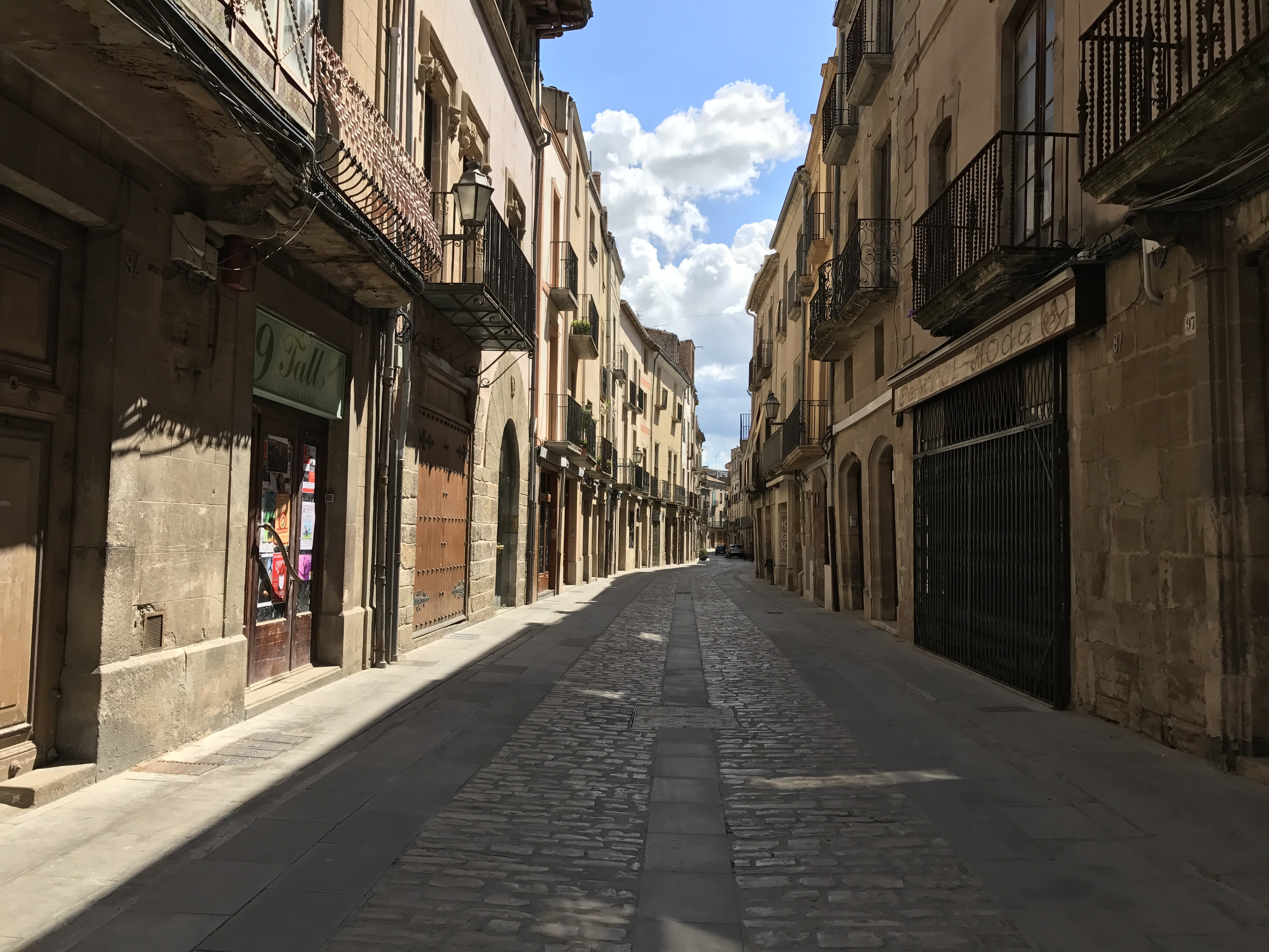 Imatge del Carrer Major de Cervera (Lleida, Catalunya)